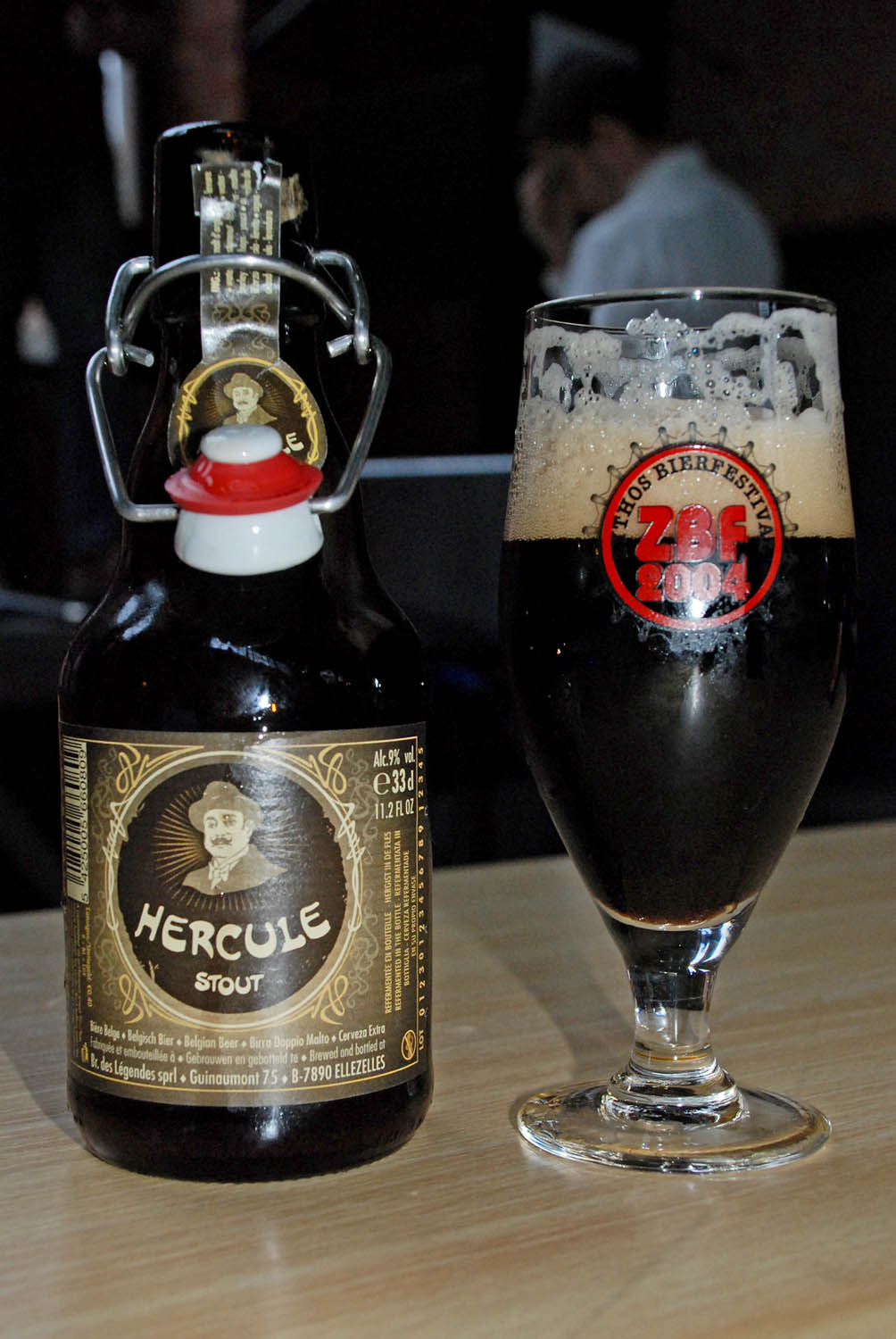 Hercule Stout